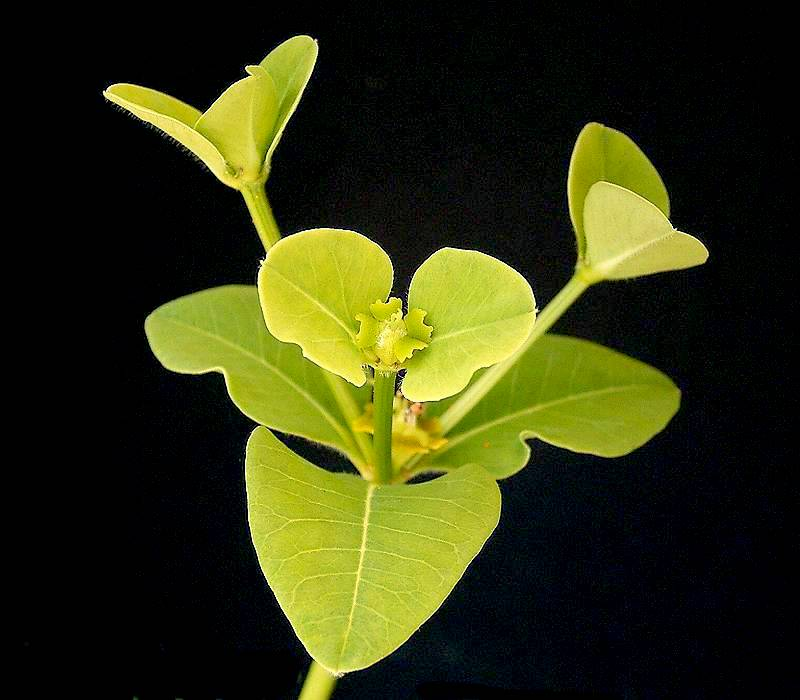 Euphorbia transvaalensis